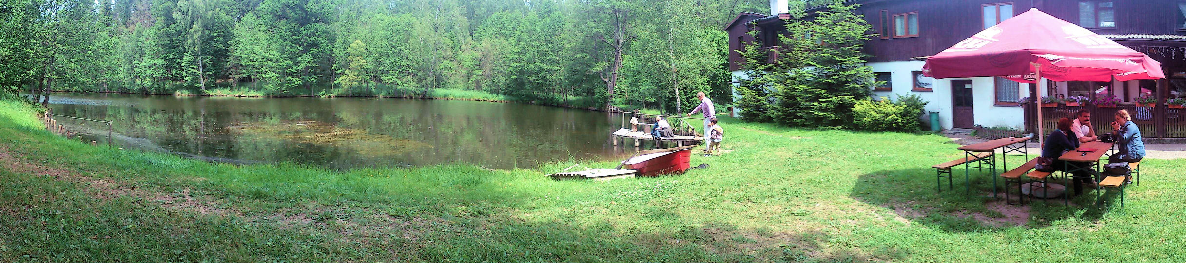 Restauracja nad jeziorem, Iłowiec, gmina Wałcz, województwo zachodniopomorskie